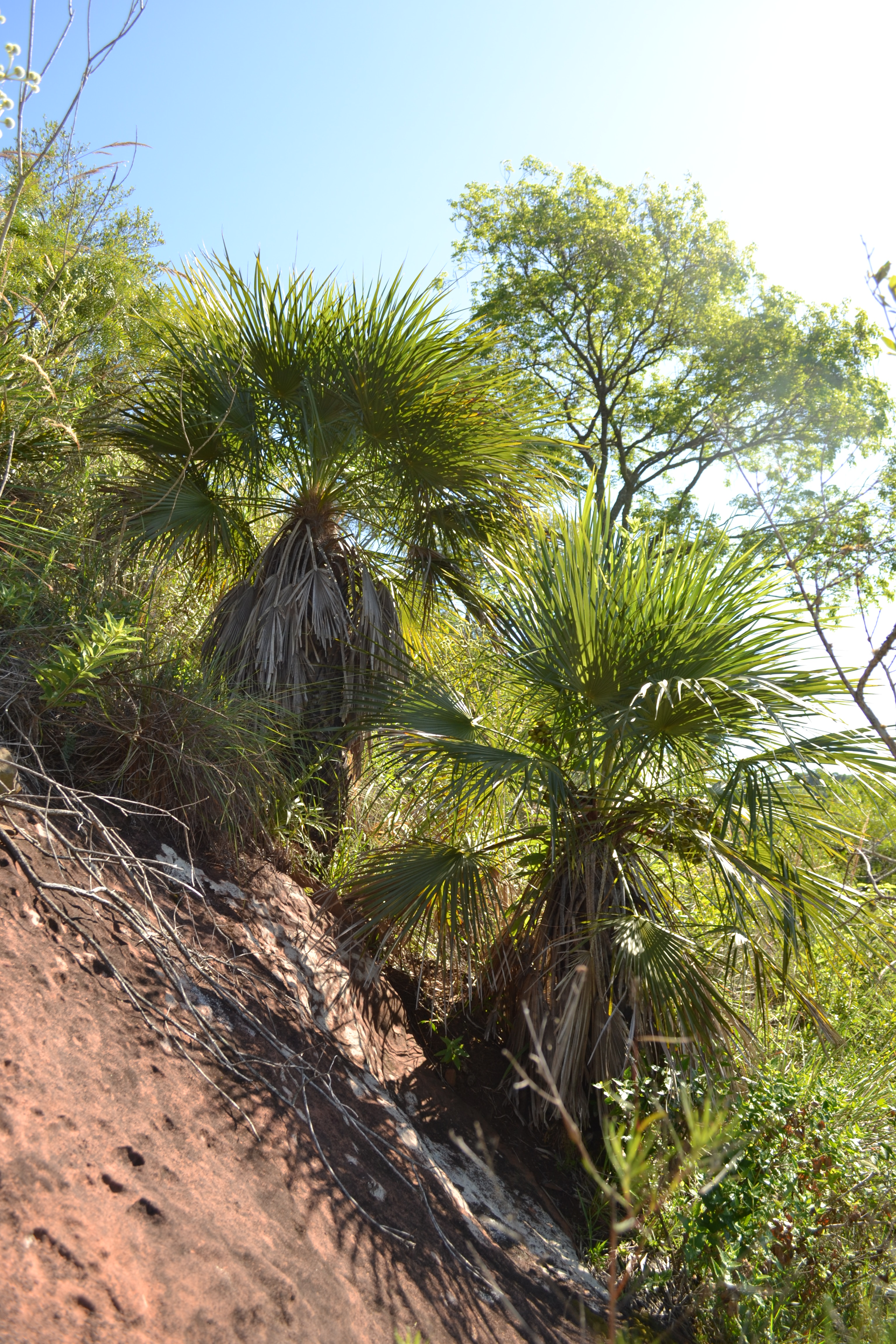 Grupo de Trithrinax brasiliensis em afloramento rochoso em Santa Maria, RS